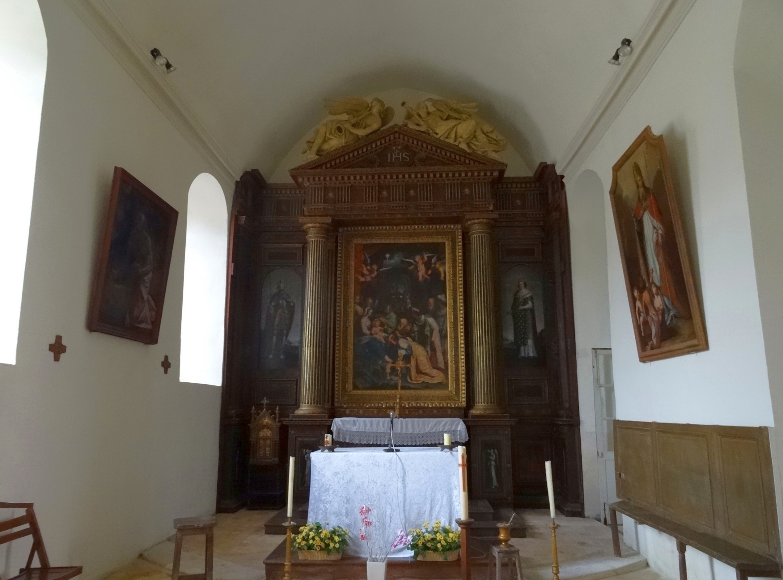 Intérieur de l'église Saint-Nicolas de Dhuisy. (Seine-et-Marne, région Île-de-France).